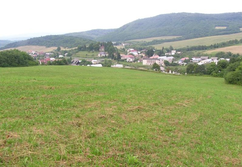 Celkový pohľad